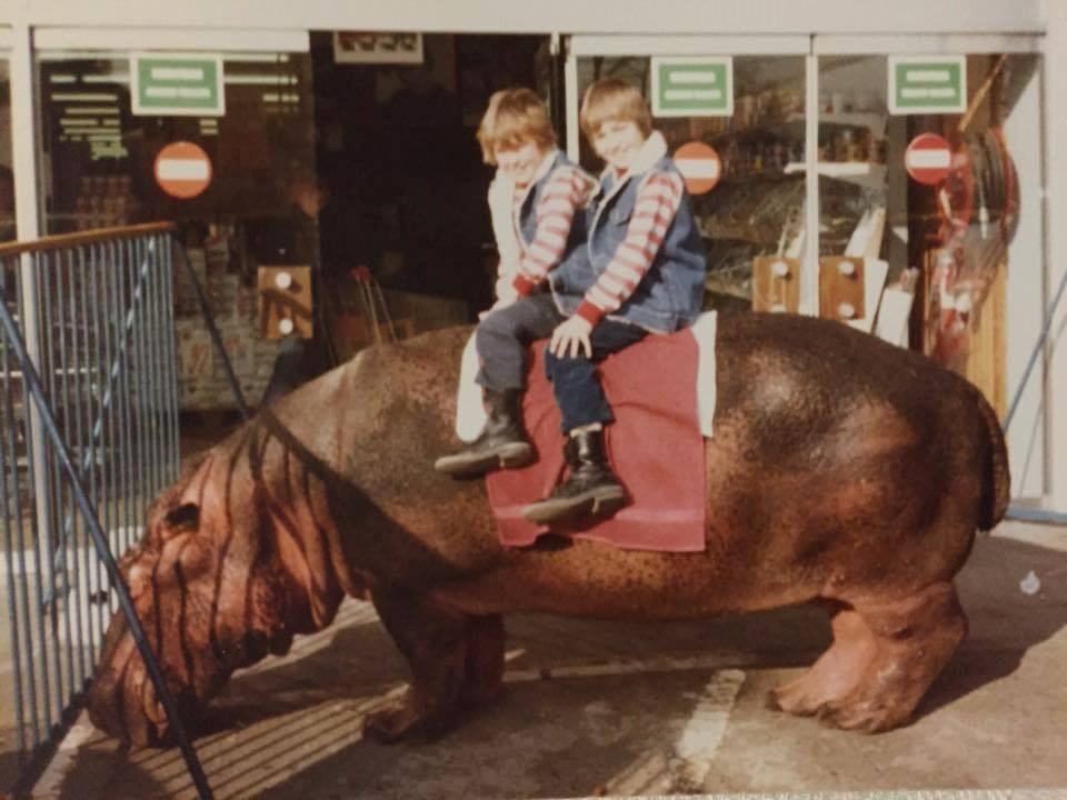 Foto genomen in 1983 van mijn zonen .